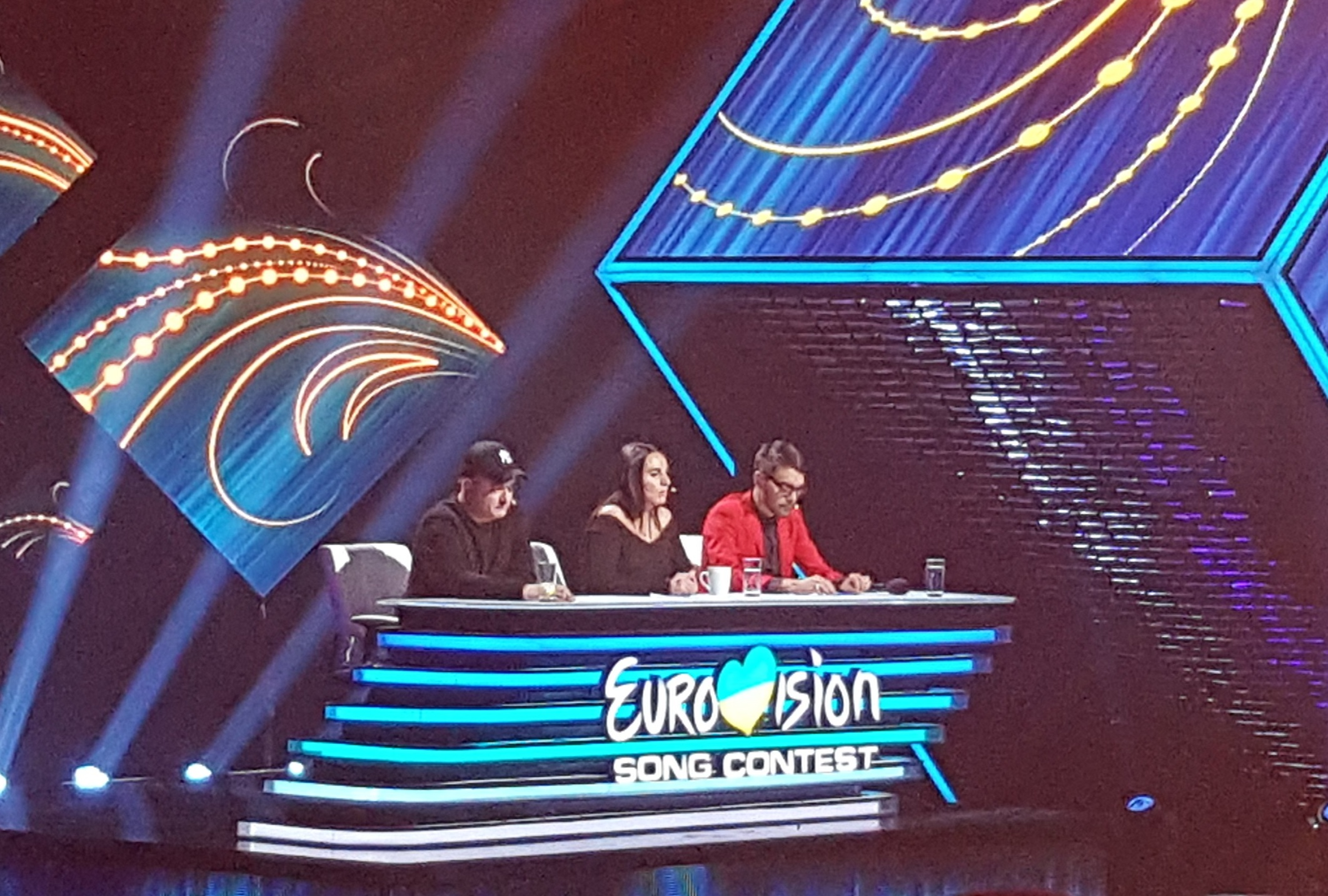 Jurorzy krajowych eliminacji do 63. Konkursu Piosenki Eurowizji "Widbir 2018".